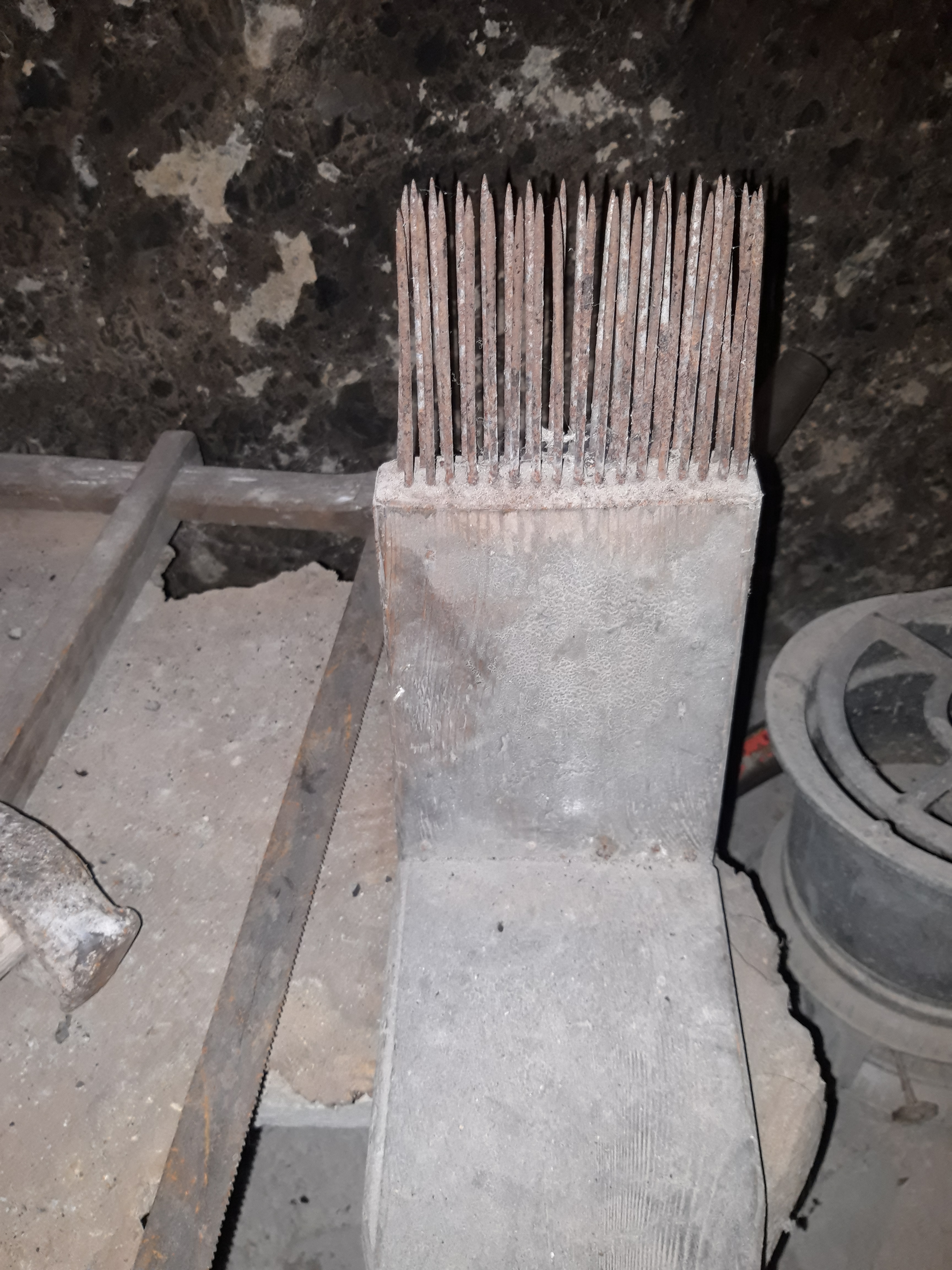 Սանդերք, սանտերք, տնային պայմաններում բուրդ կամ բամբակ գզելու գործիք